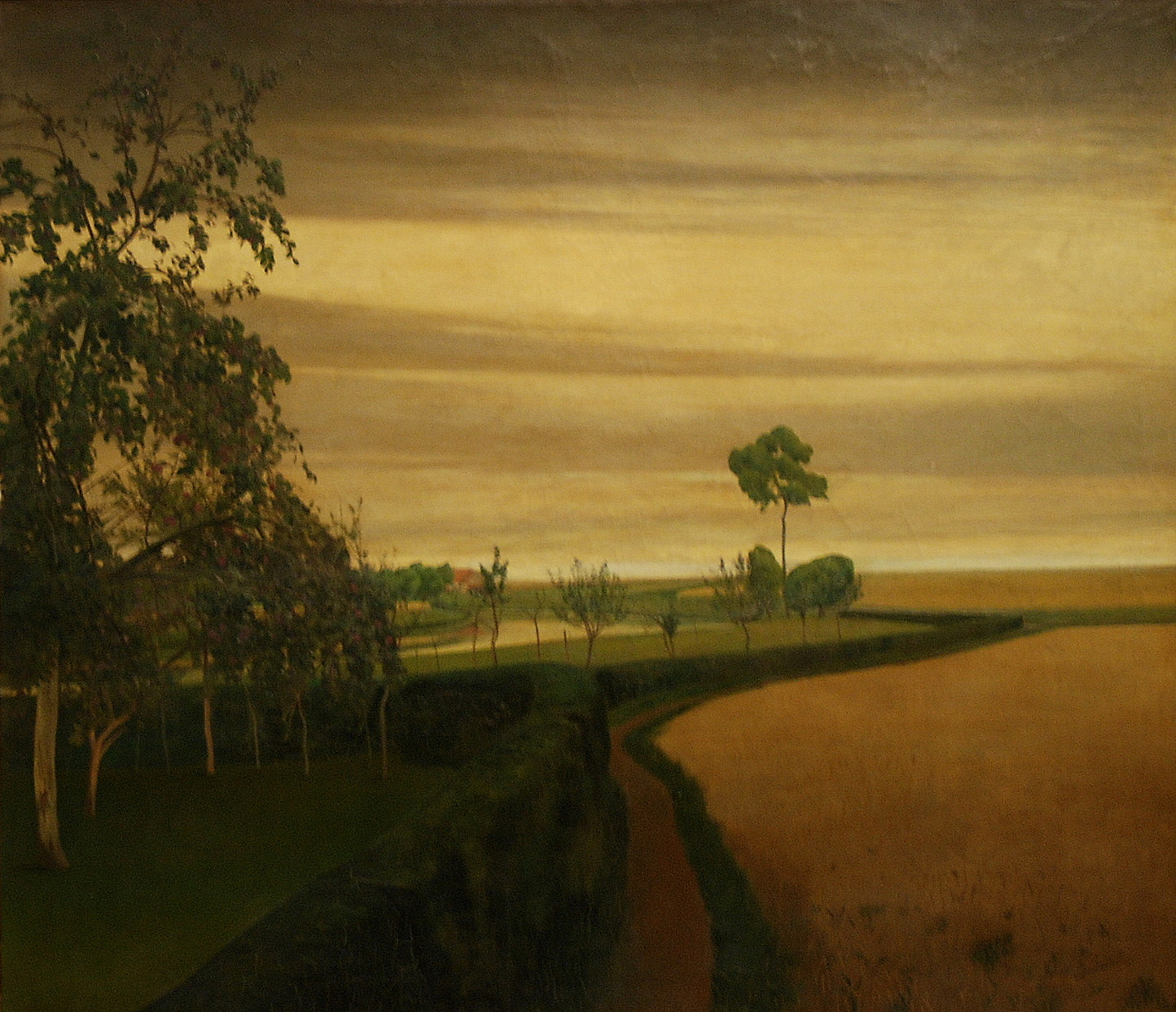 Valerius de Saedeleer (1867-1941) - Einde van een sombere dag - MSK Gent Wikidata has entry Q21675004 with data related to this item.